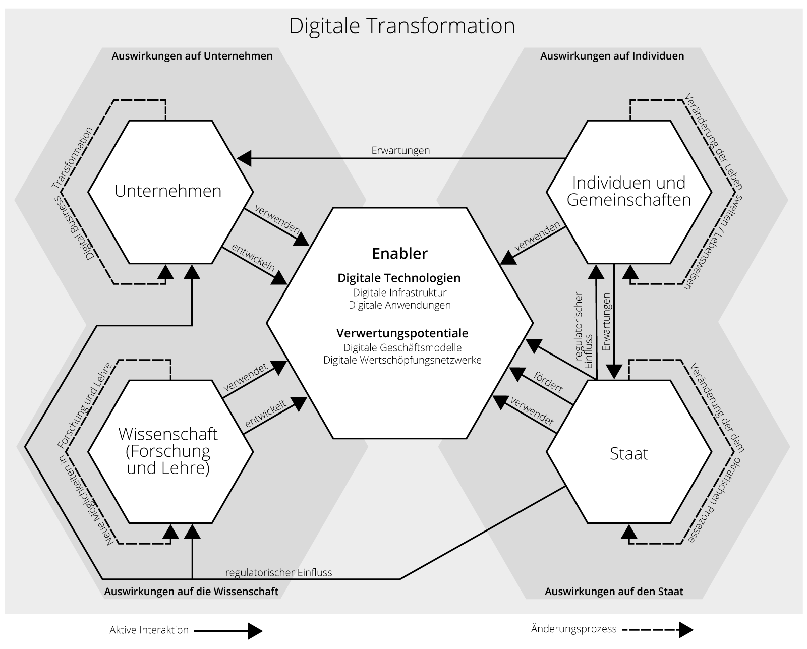 Die digitale Transformation ist ein fortlaufender, in digitalen Technologien begründeter, Veränderungsprozess, der die gesamte Gesellschaft und insbesondere Unternehmen betrifft.